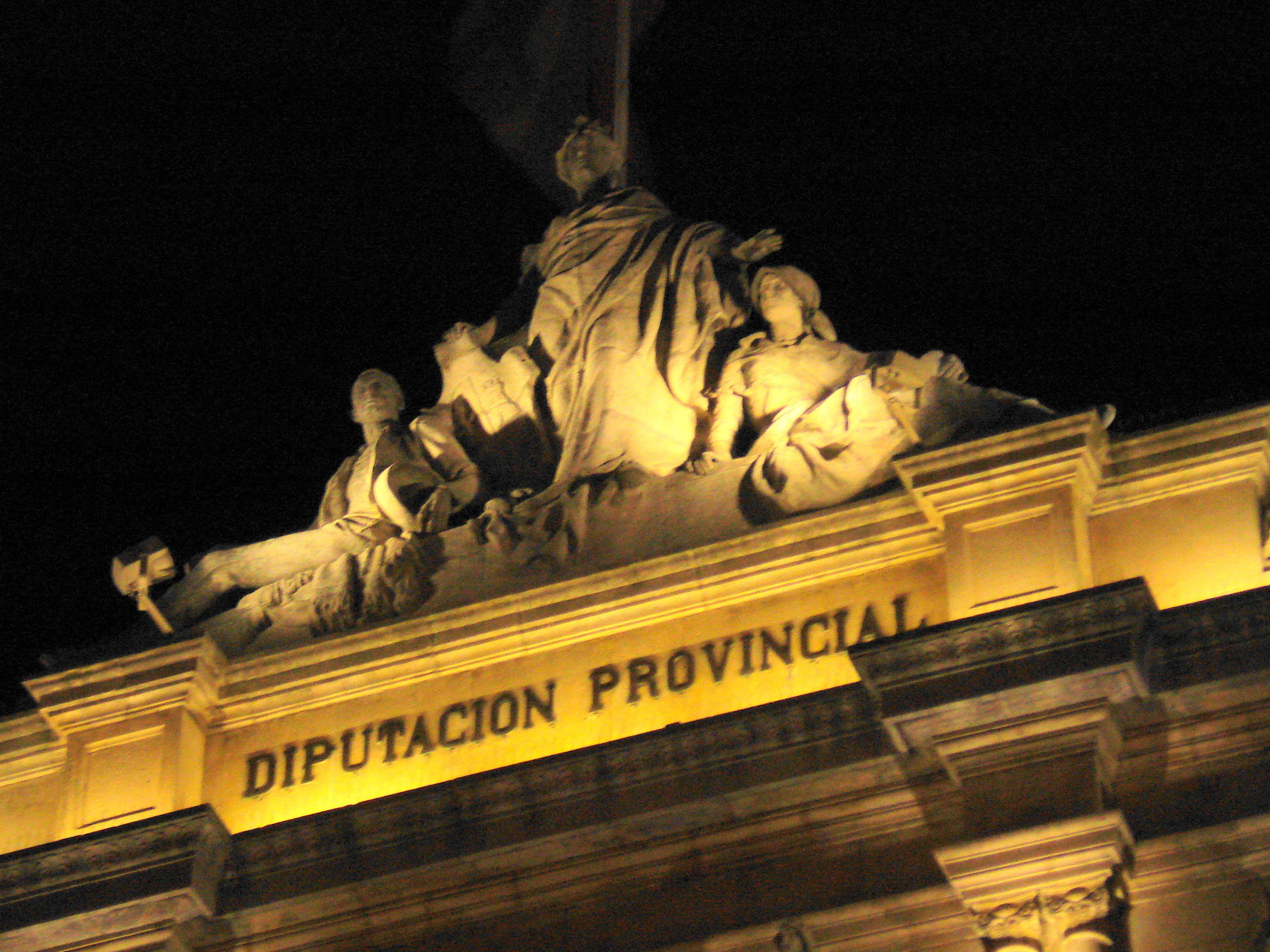 Detalle del Palacio de la Diputación de Palencia. Alegoría a la provincia y los palentinos.